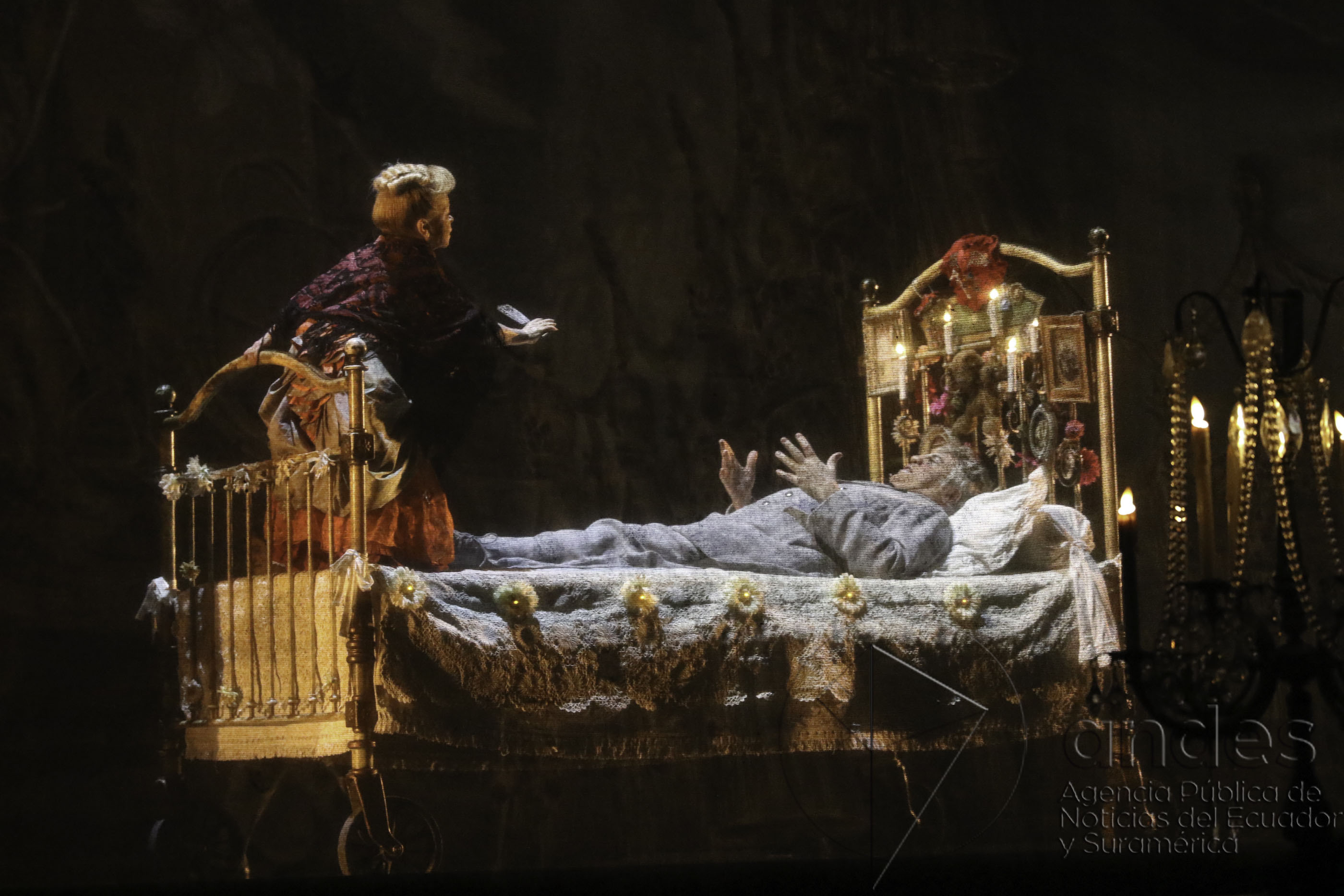 Quito, 18 nov (Andes).- El Circo del Sol presentó la obra Corteo’ que pone en escena a un total de 90 artistas, acróbatas y músicos, que representan la vida de un payaso que imagina su propio funeral. ANDES/Micaela Ayala V.